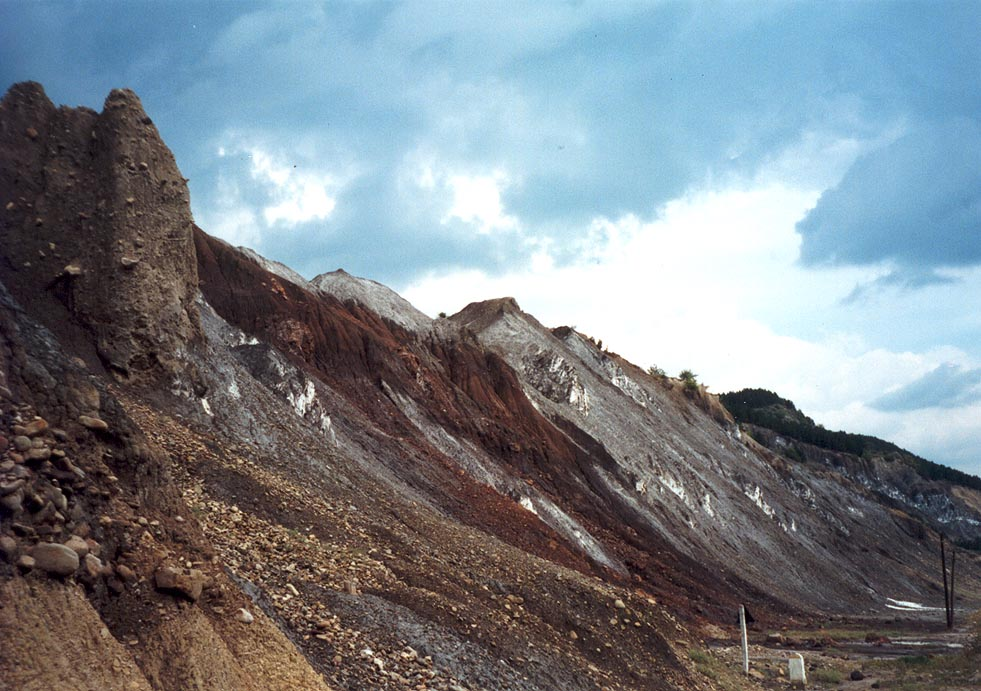 Salt plateau Meledic near Mînzăleşti (Buzau County)